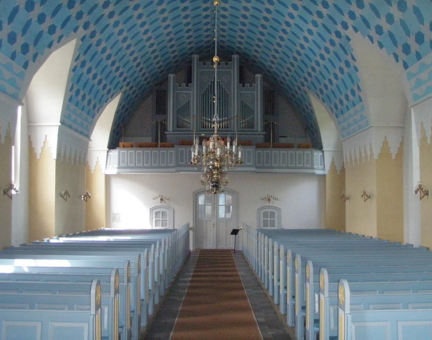 Hobro Kirke